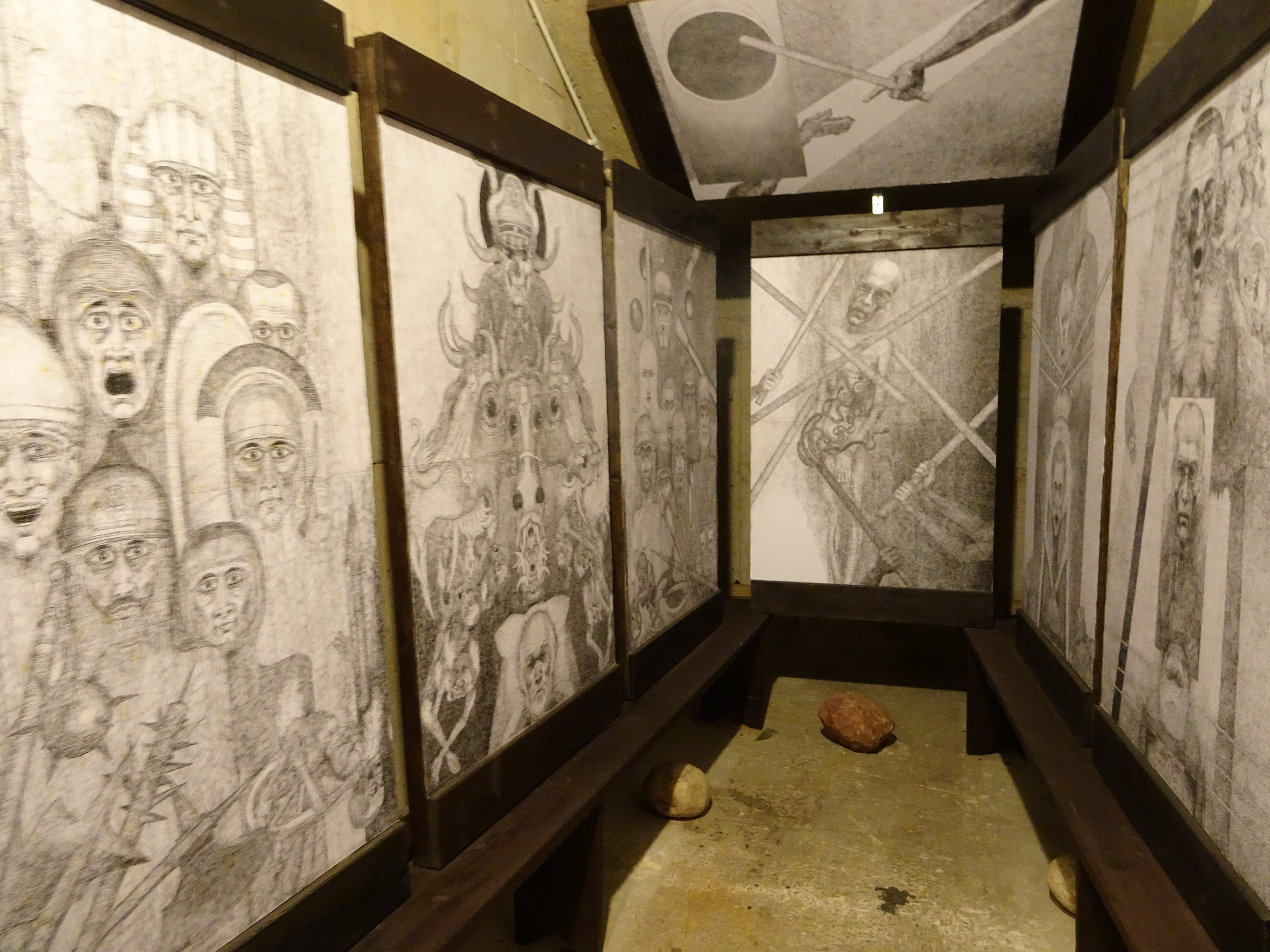 Harmęże (województwo małopolskie), Centrum św. Maksymiliana, "Klisze Pamięci" Mariana Kołodzieja.